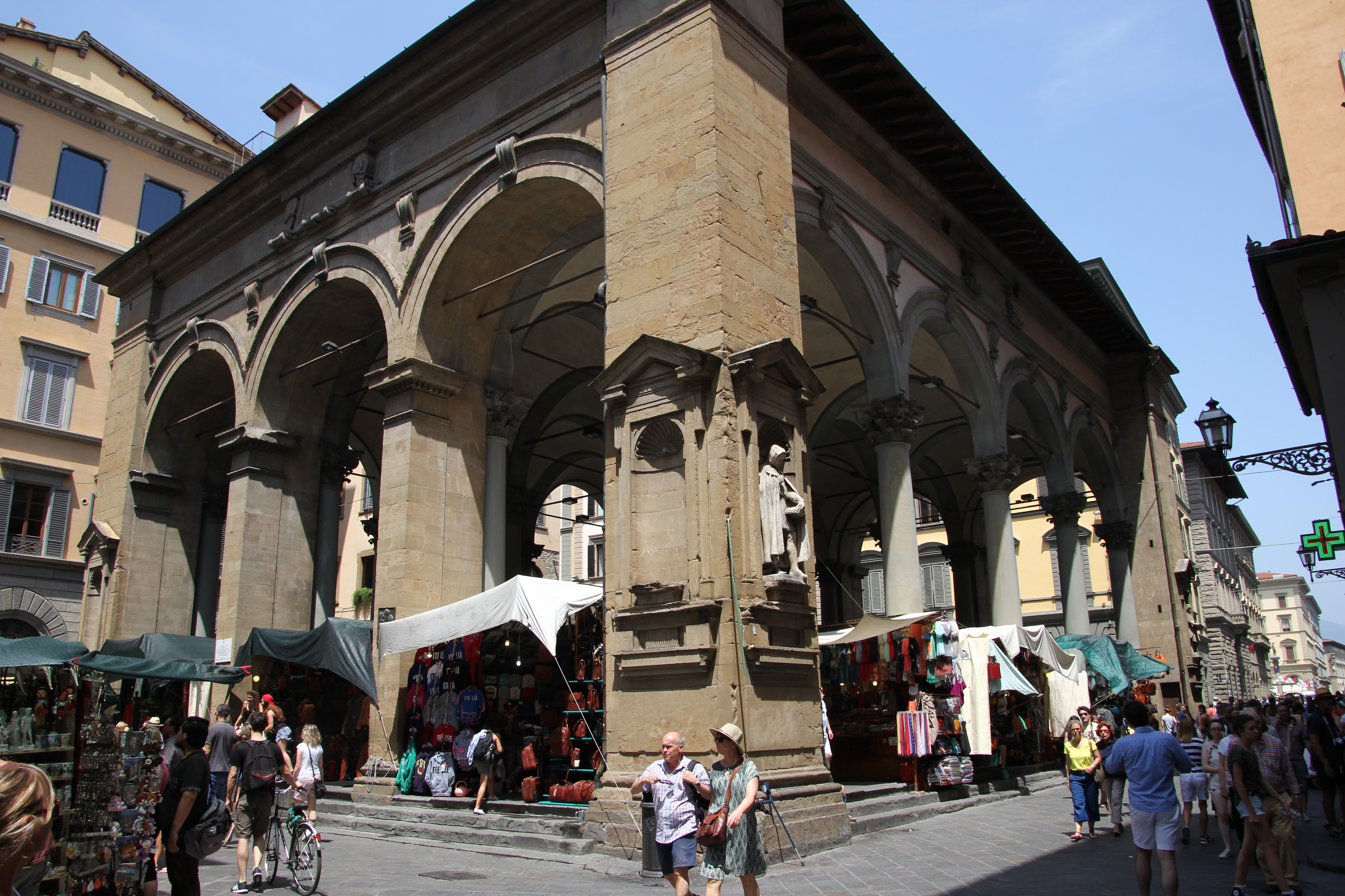 Firenze, loggia del Mercato Nuovo